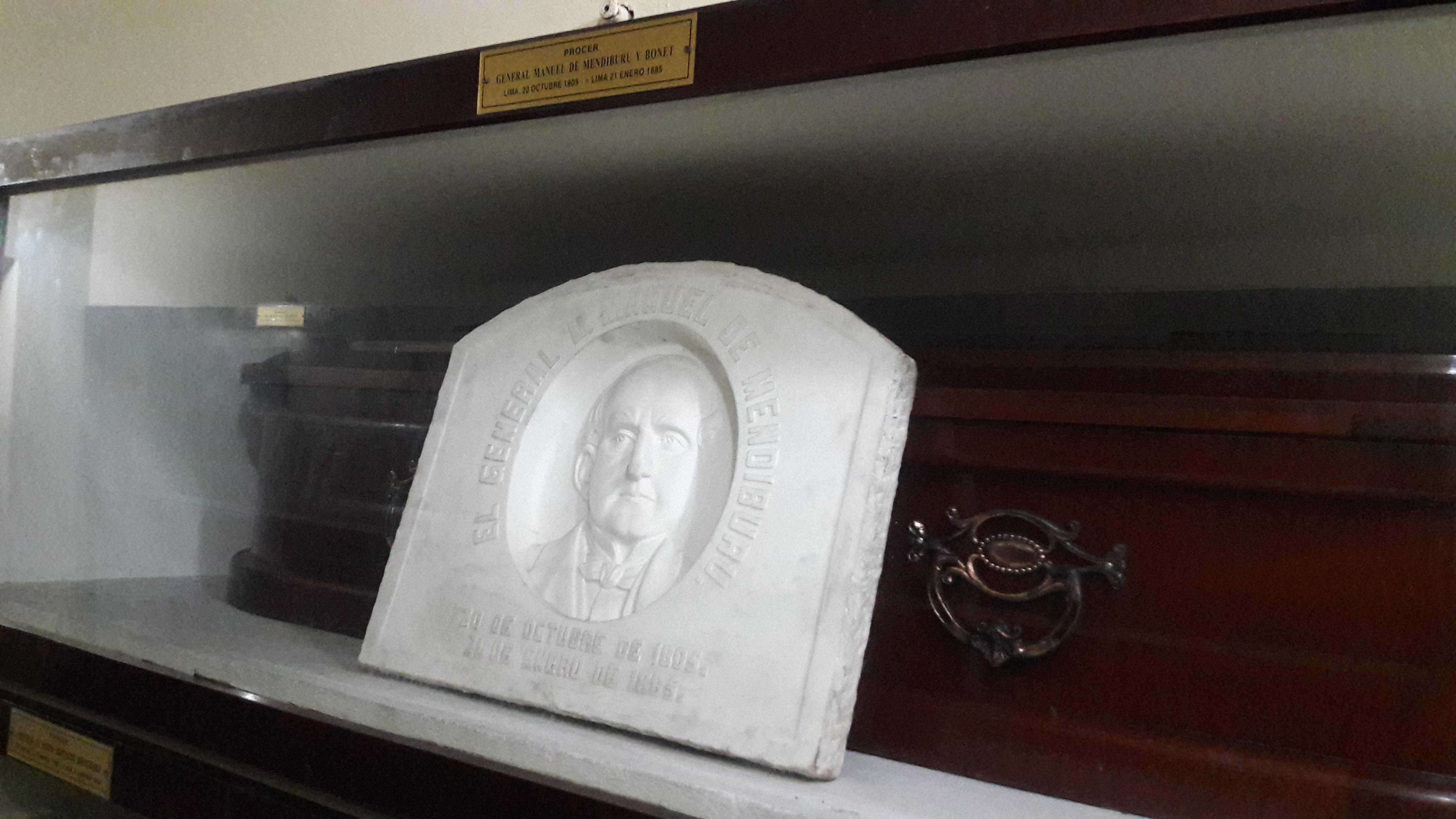 Tumba de Manuel de Mendiburu